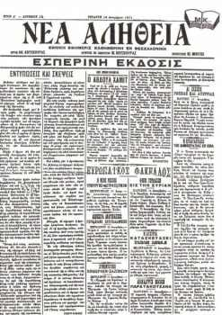 Главата на вестник "Неа Алития".